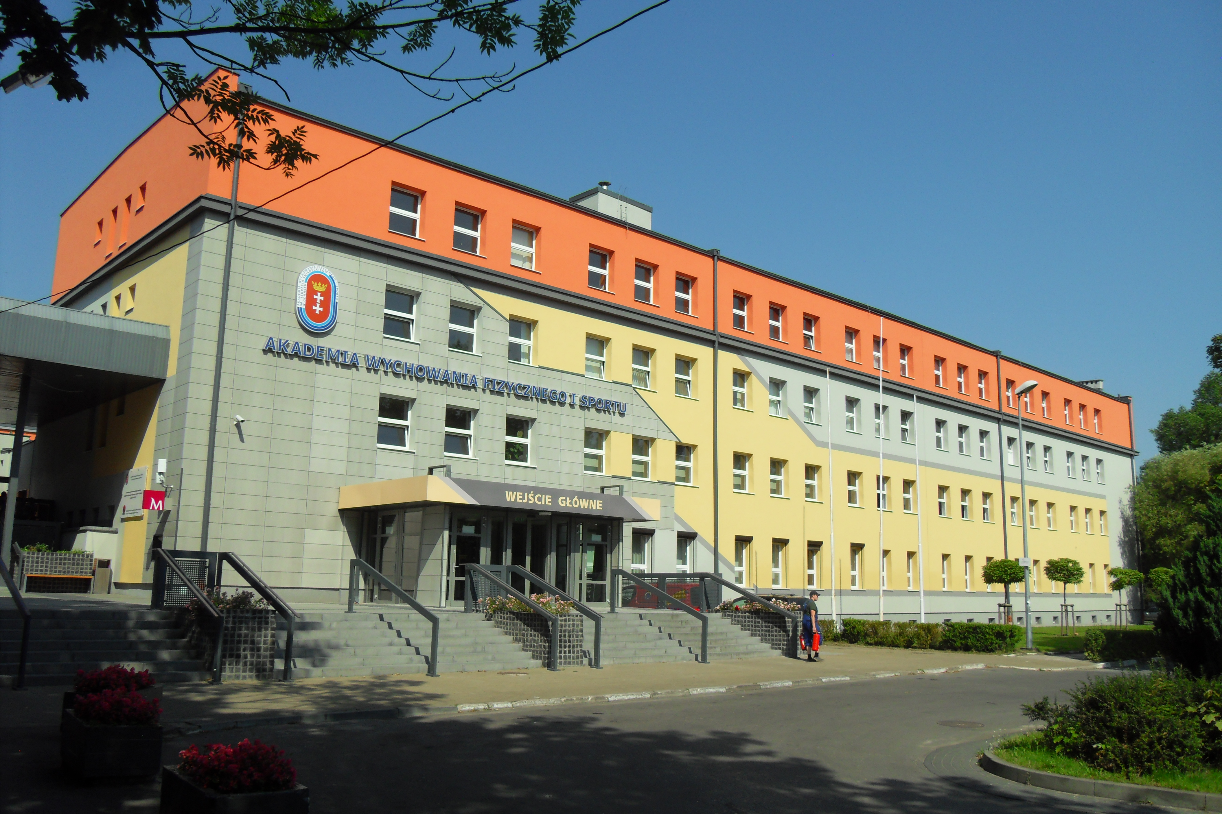 Gdańsk Oliwa. Akademia Wychowania Fizycznego i Sportu, gmach główny.